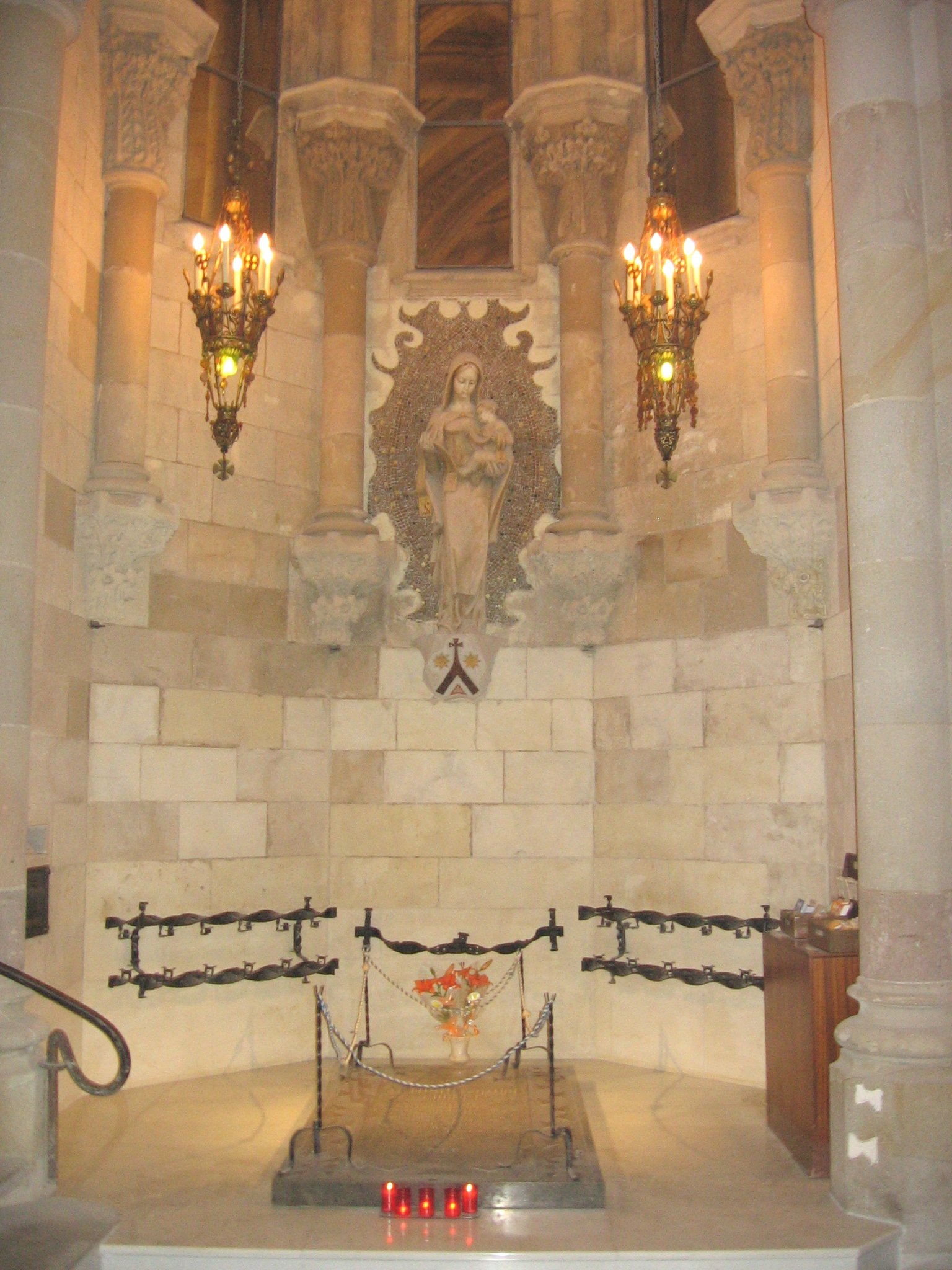 Capilla de Nuestra Señora del Carmen, cripta de la Sagrada Familia. En el suelo, la tumba de Gaudí.